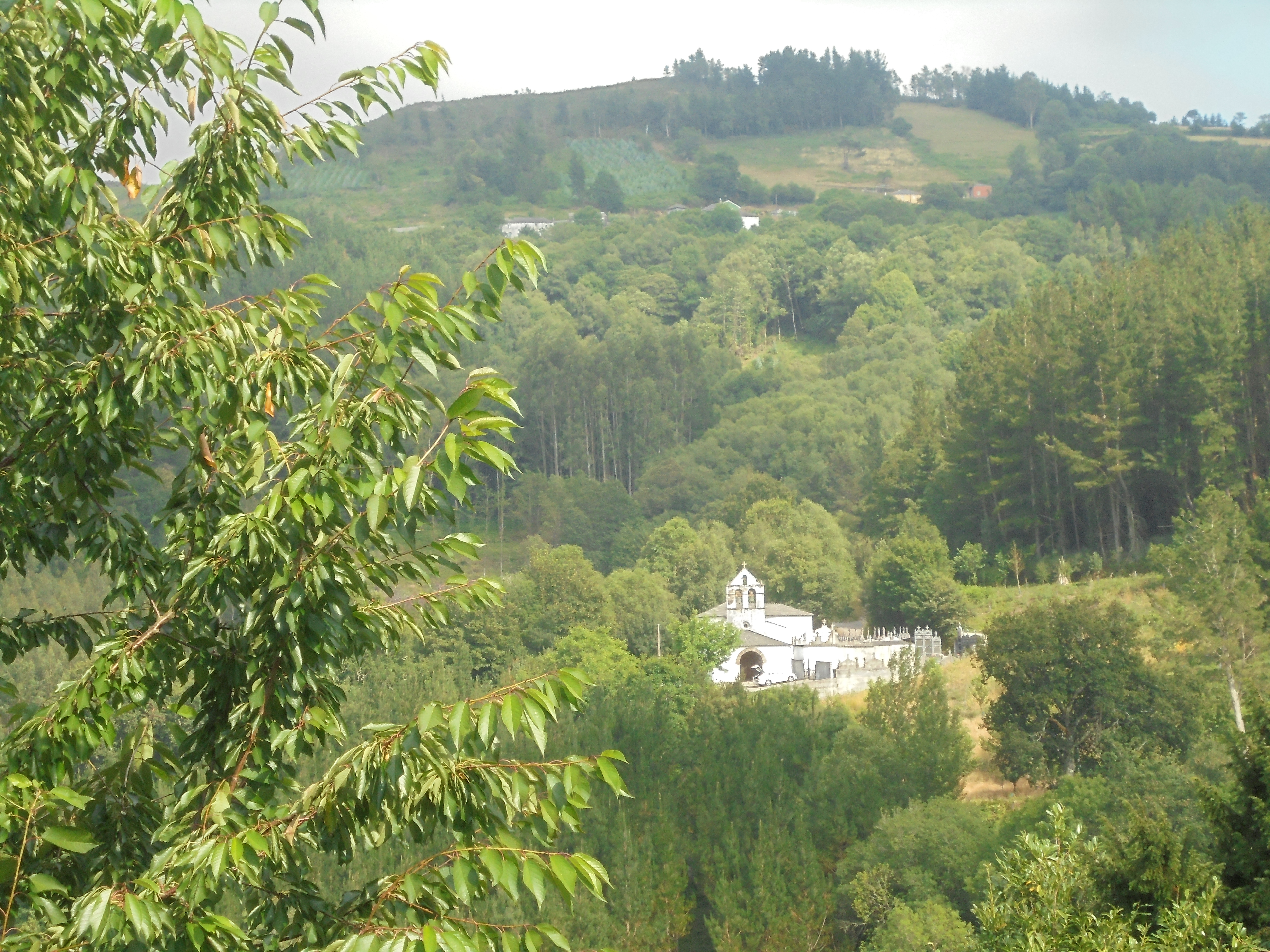 Vista de Santiago de Martín ( Baleira )